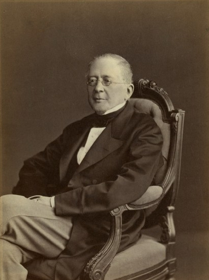 Горчаков, Александр Михайлович